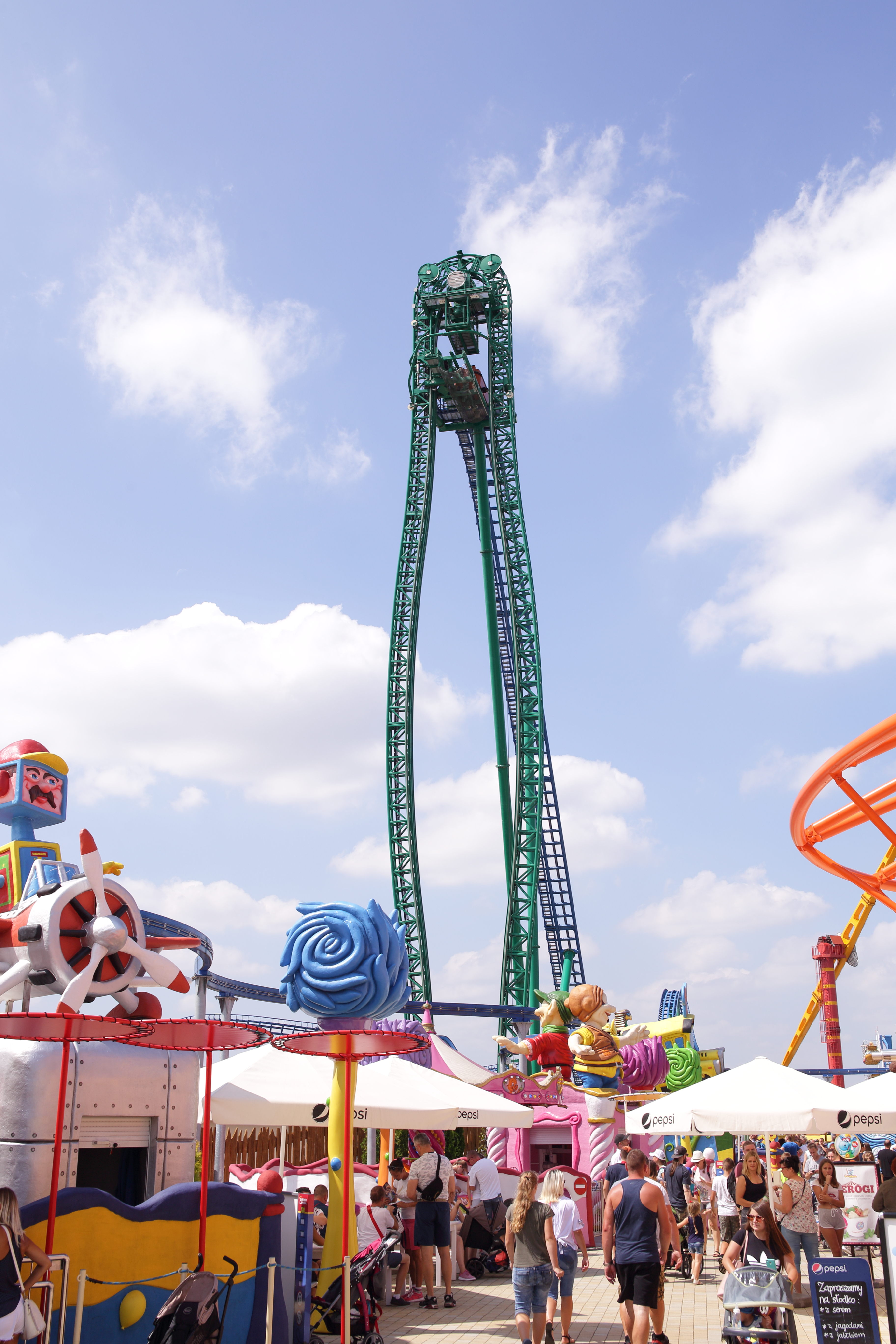 Główna wieża kolejki górskiej Speed w parku Energylandia.